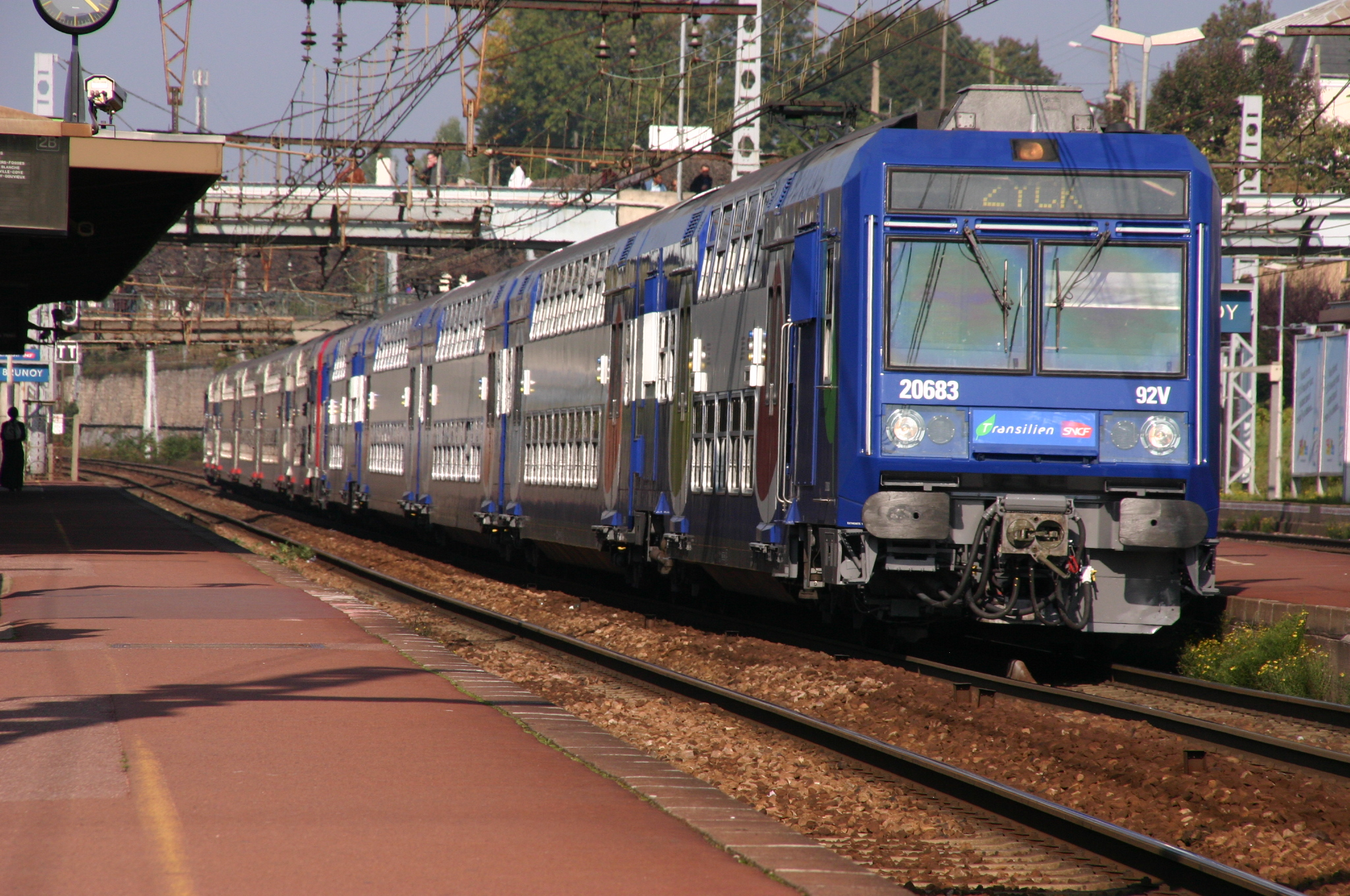 La Gare de Brunoy, Brunoy, département de l'Essonne, France